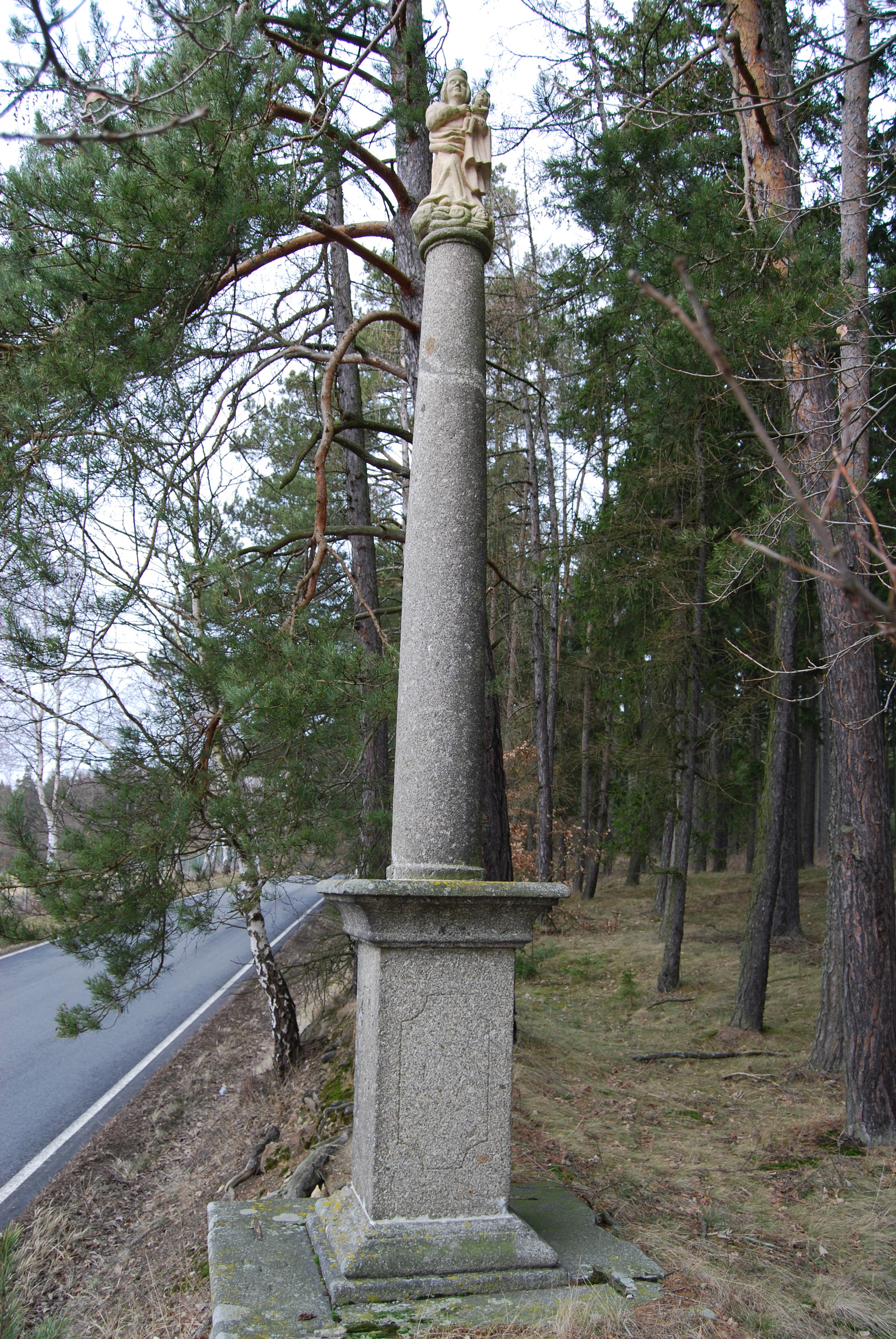 Morový mariánský sloup. Milevsko. Okres Písek. Česká republika. Morový sloup u silnice z Milevska do Kovářova je vysoký 4 metry, je ze žuly. Na podstavci je vytesaný letopočet 1735 a setřelý, nečitelný nápis. Na vrcholu je replika sochy Panny Marie. Byl postaven po epidemii moru. Podstavec je originální, sloup a socha byly do roku 2002 odcizeny. Umístěna kopie z roku 2006.